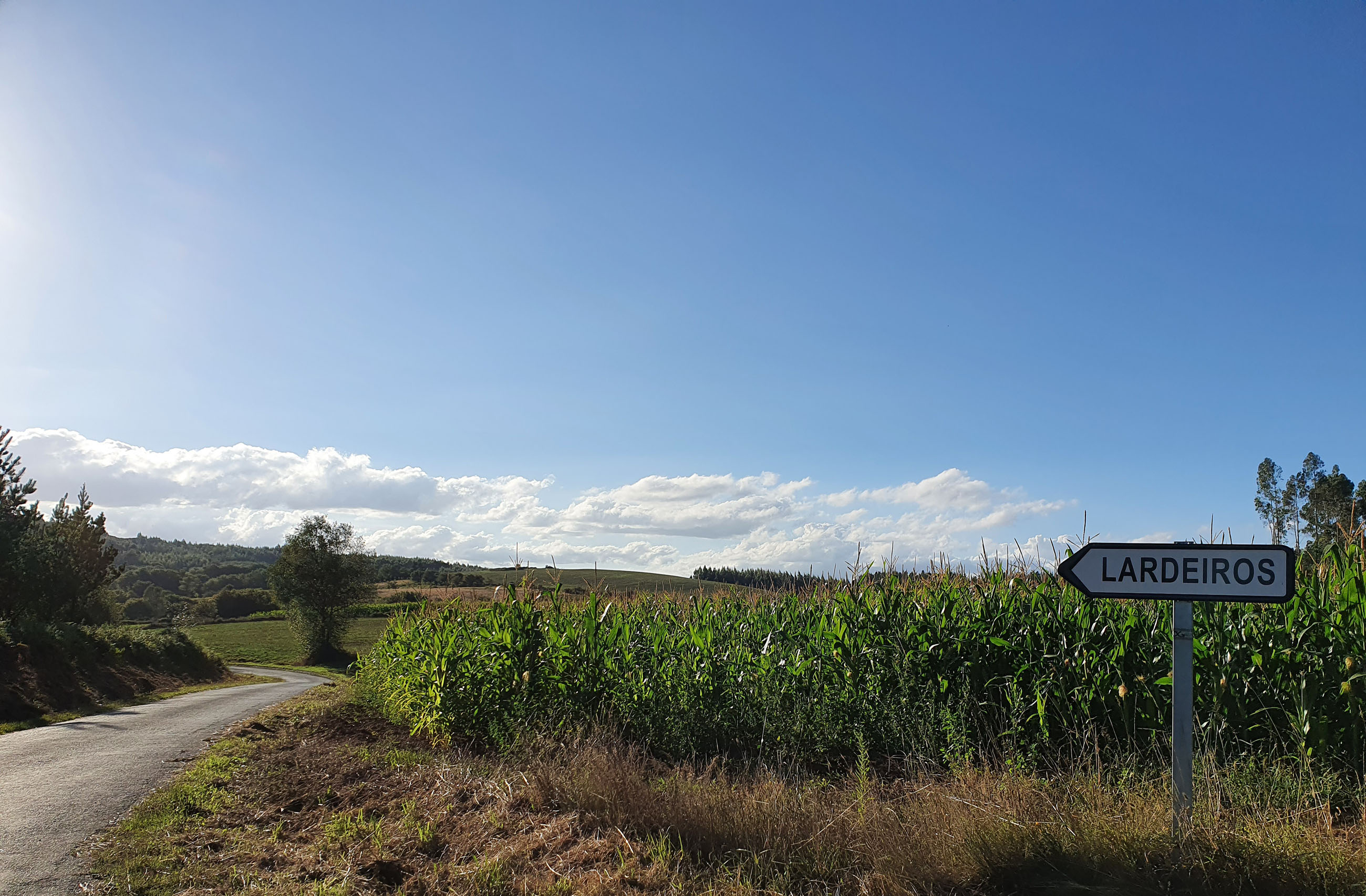 Lugar de Lardeiros, da parroquia monterrosina de Ligonde.